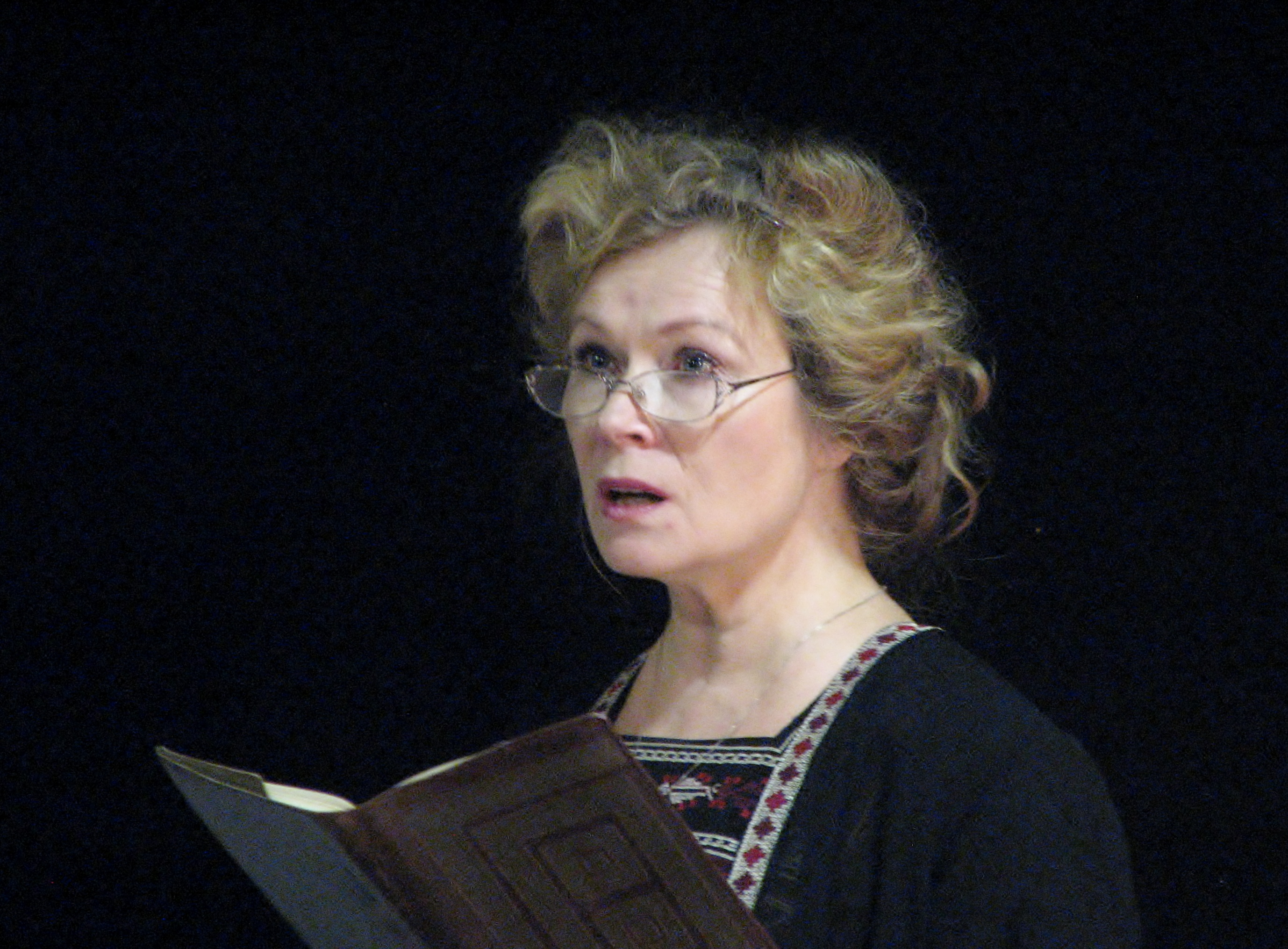 Doris Kareva Rahvusraamatukogu teatrisaali laval festivali III Dovlatovi Päevad Tallinnas raames